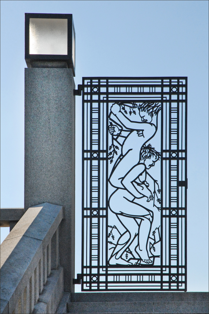 Porte en fer forgé donnant accès au plateau du monolithe Gustav Vigeland (Mandal, 11 avril 1869 - Kirkeveien, 12 mars 1943) est un sculpteur norvégien. Sa principale réalisation se trouve au Frognerpark, le plus grand parc d'Oslo, où sont exposées 214 de ses œuvres. extrait de Wikipedia